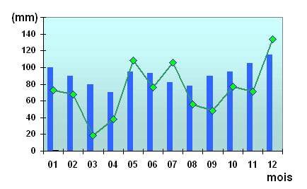 Diagramme des précipitations moyennes annuelles dans le Territoire de Belfort Tracé par F5ZV le 07/03/2006